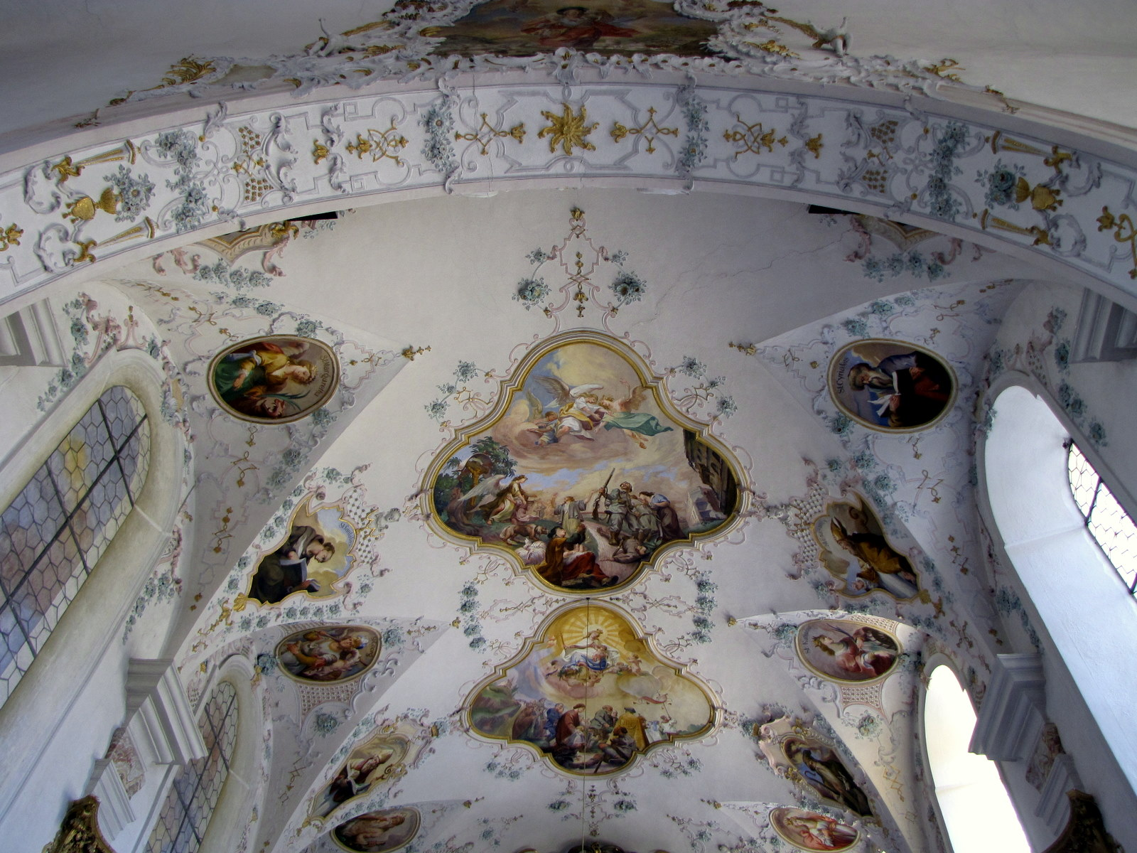 Chorstuck in der Pfarrkirche Petersthal von Joseph Fischer